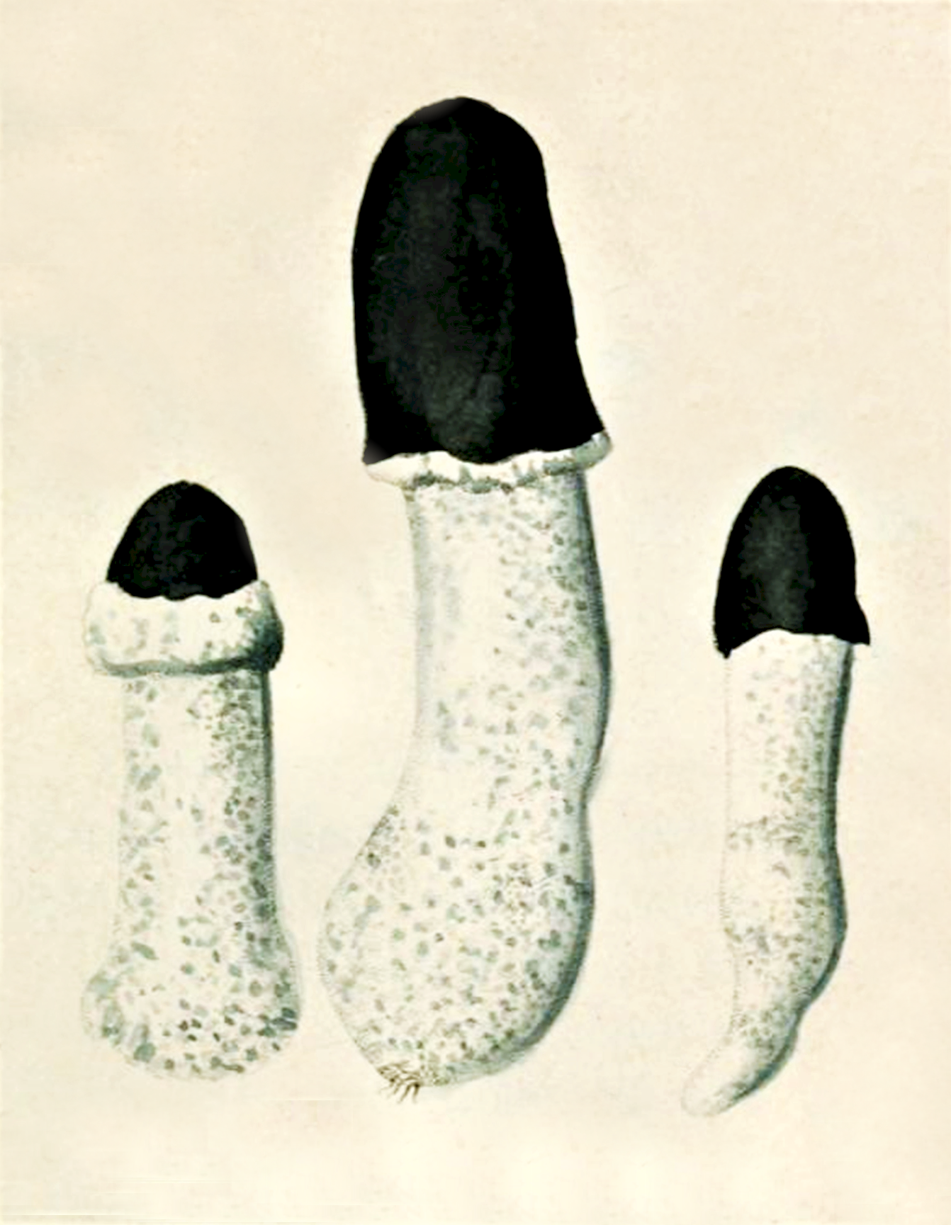 Jacob Sturm: Verpa atro-alba Fr. (1822)